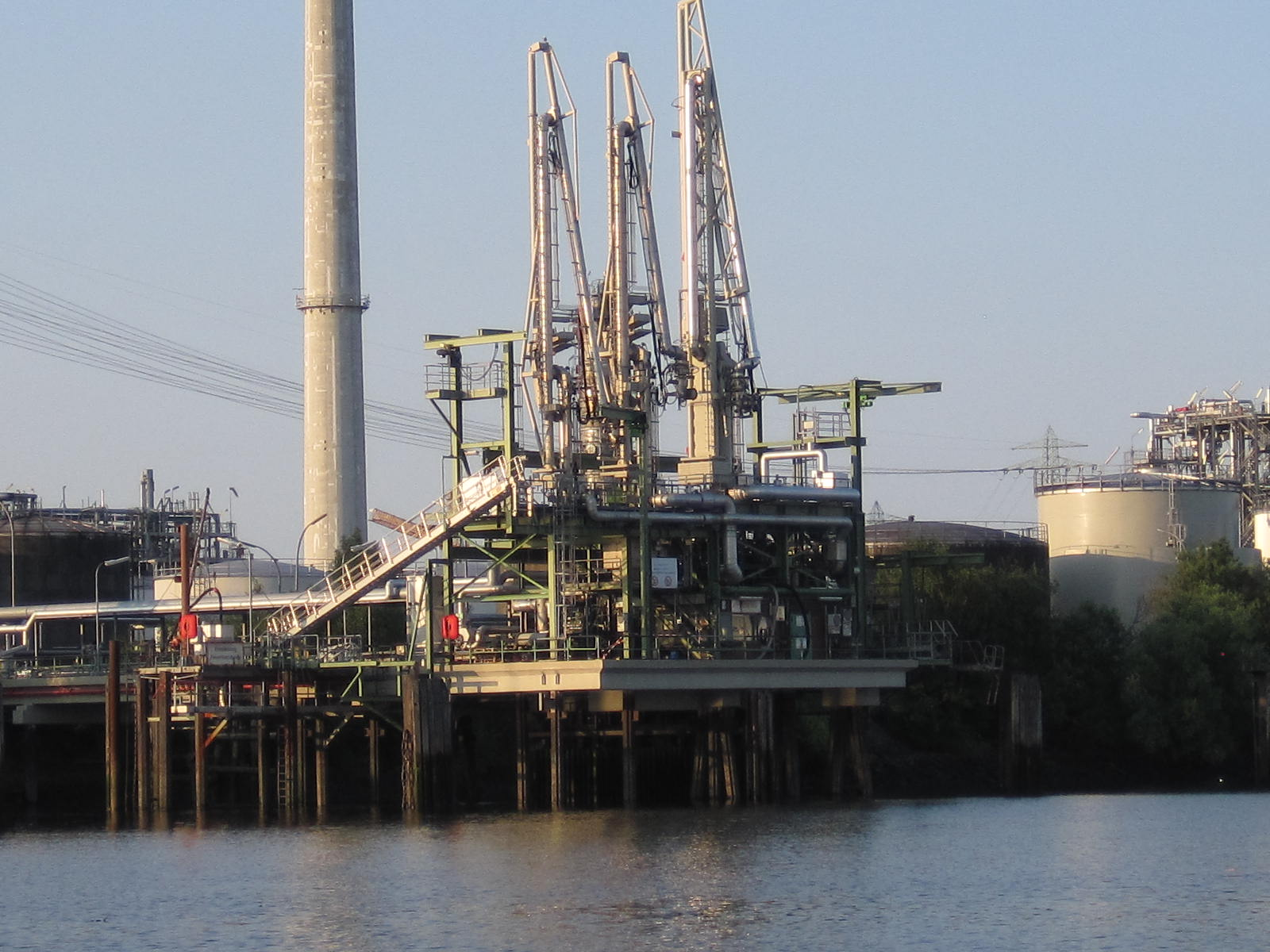 Löschbrücke für Tanker und Tankbinnenschiffe im Neuhöfer Hafen Hamburg